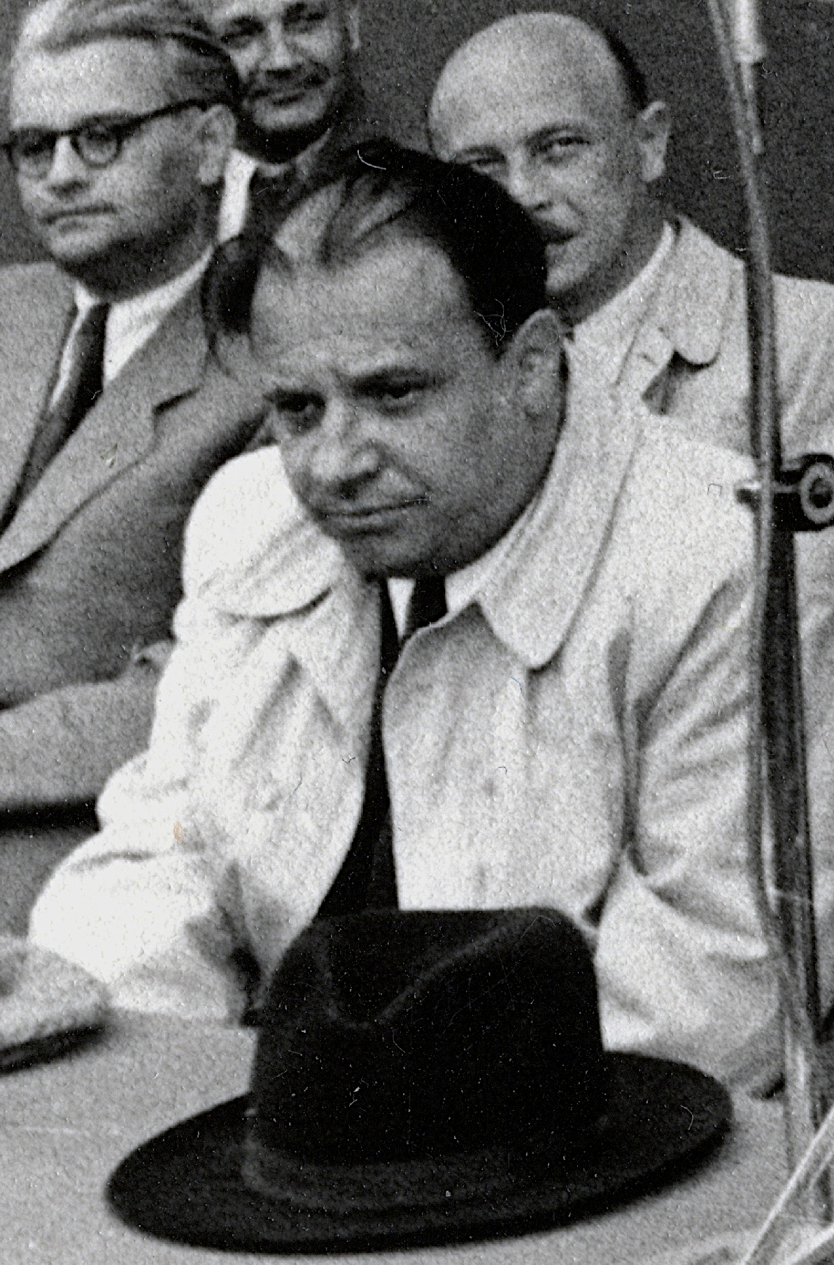 Farkas MIhály kommunista politkus